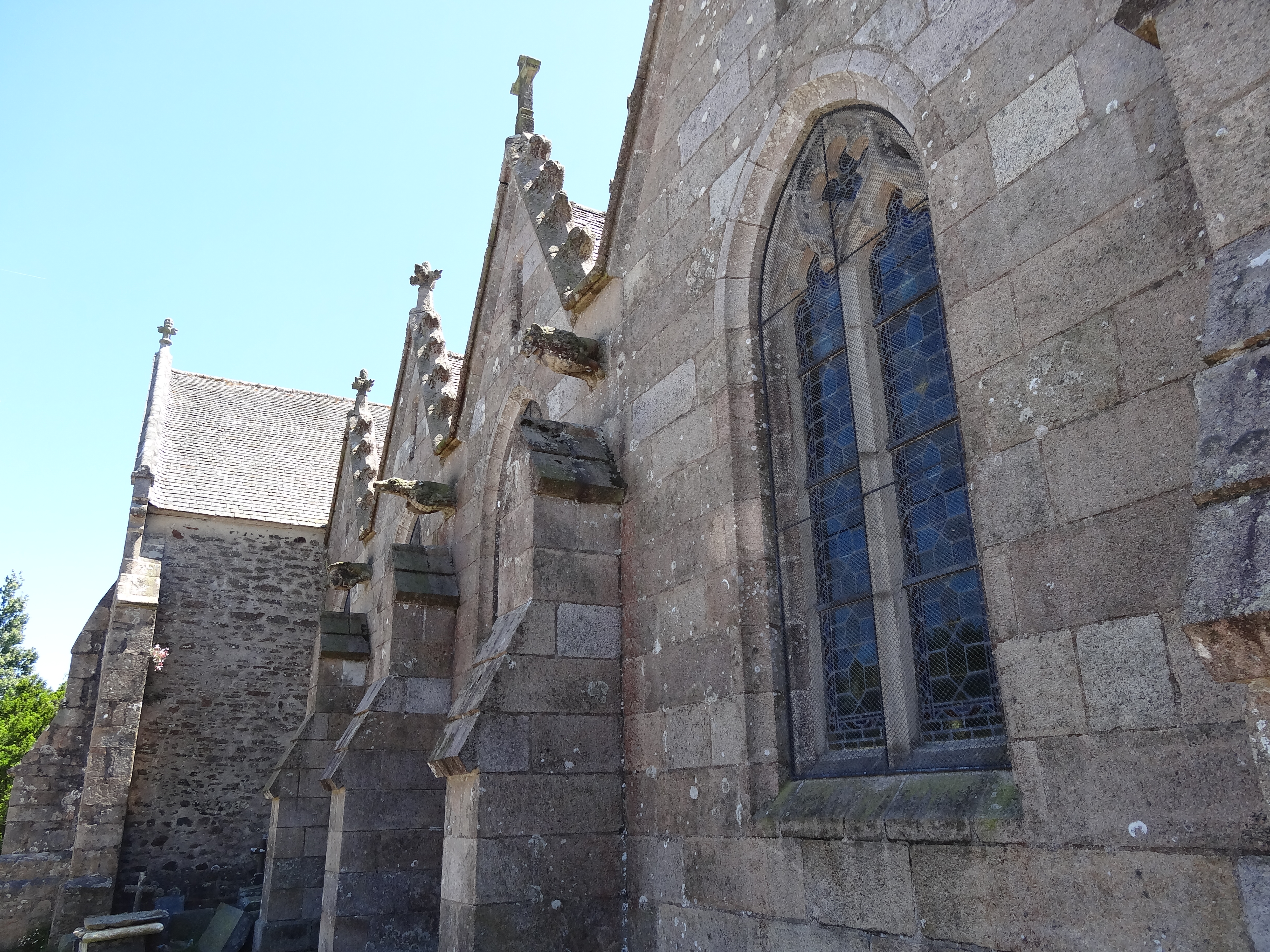 Sur la façade nord de l'église de Runan, on distingue trois gargouilles figurant un lion, un aigle et un ivrogne.